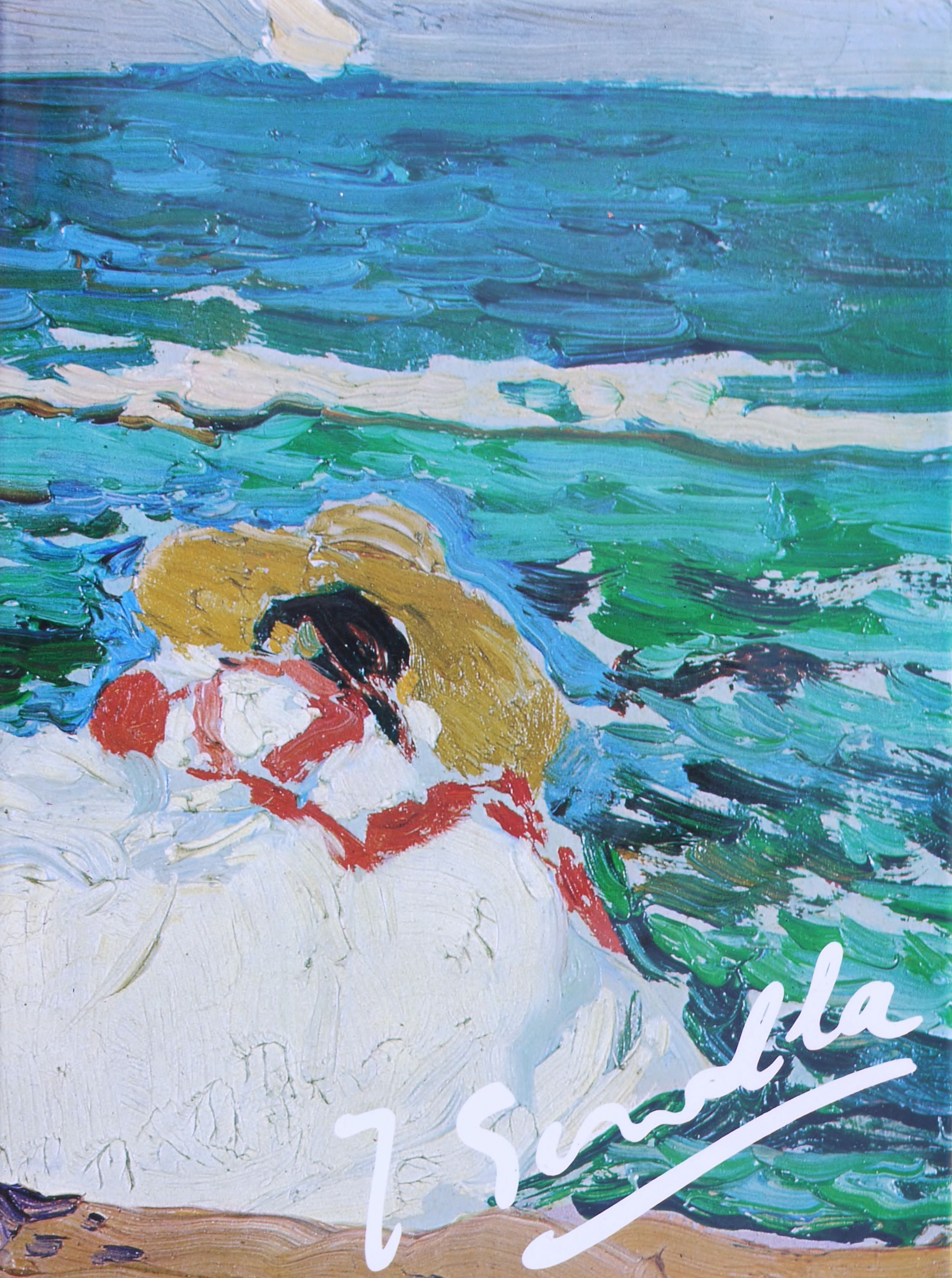 Sorolla. Libro de Trinidad Simó Terol editado por Vicent García Editores.